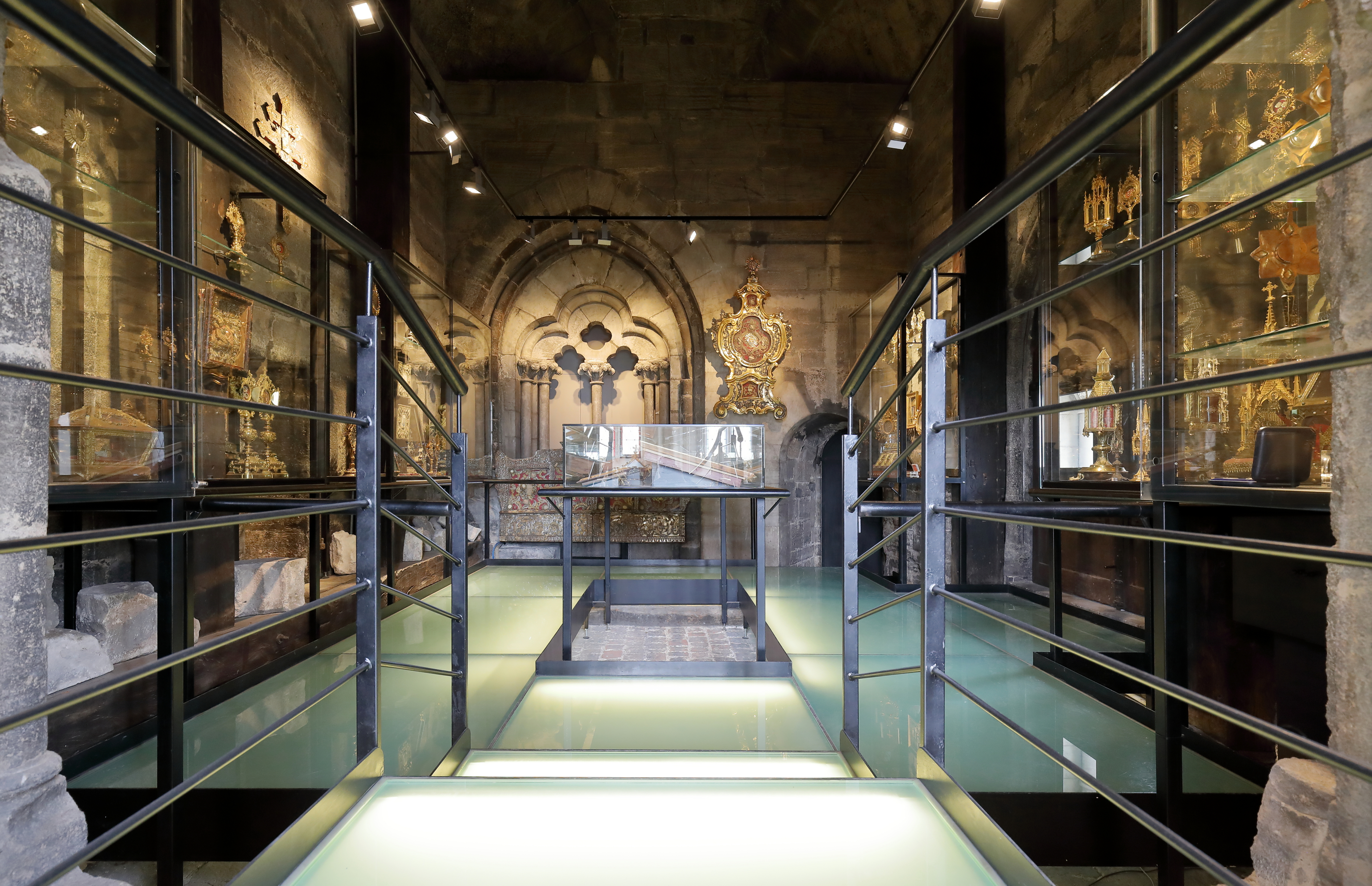 Die Turmkammer im nördlichen Heidenturm des Stephansdomes in der österreichischen Bundeshauptstadt Wien. Im Zuge der Renovierung der Reliquien- bzw. Valentinskapelle wurde ein Zugang zur benachbarte romanischen Turmkammer geschaffen, in der nun ebenfalls seit 2013 Exponate der Reliquiensammlung im Rahmen der musealen Dauerausstellung „Der Domschatz von St. Stephan“ präsentiert werden.